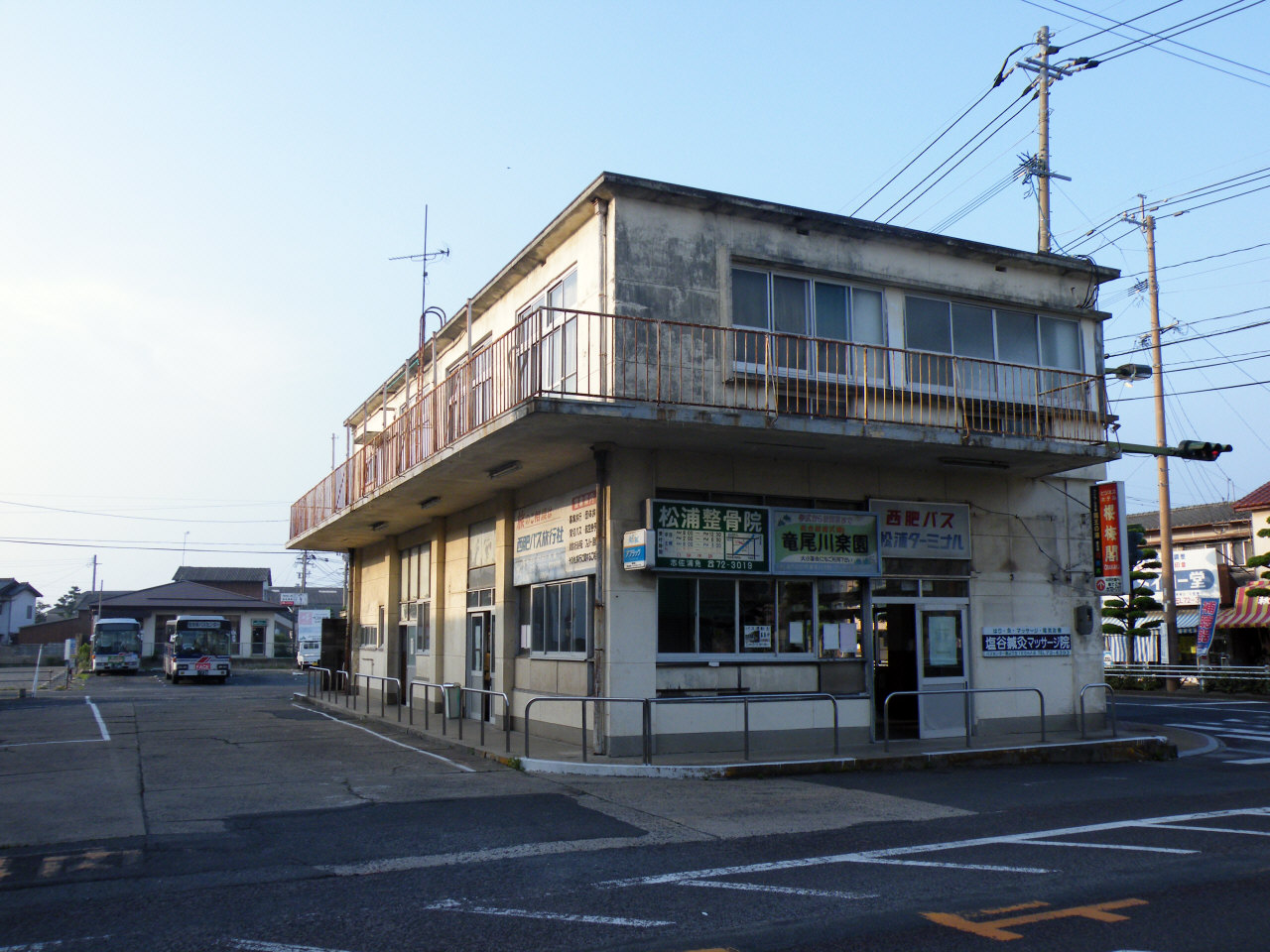 西肥自動車松浦バスセンター（長崎県松浦市）